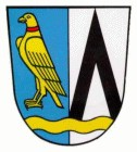 Wappen der Gemeinde Feldkirchen-Westerham